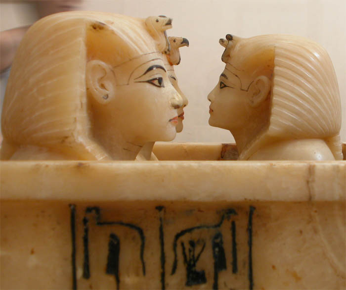 Posoda za notranje organe, ki so jih odstranili pri postoipku balzamiranja. Iz tutankamonove grobinice. Kairski muzej, slikano z dovoljenjem, brez uporabe bliskavke